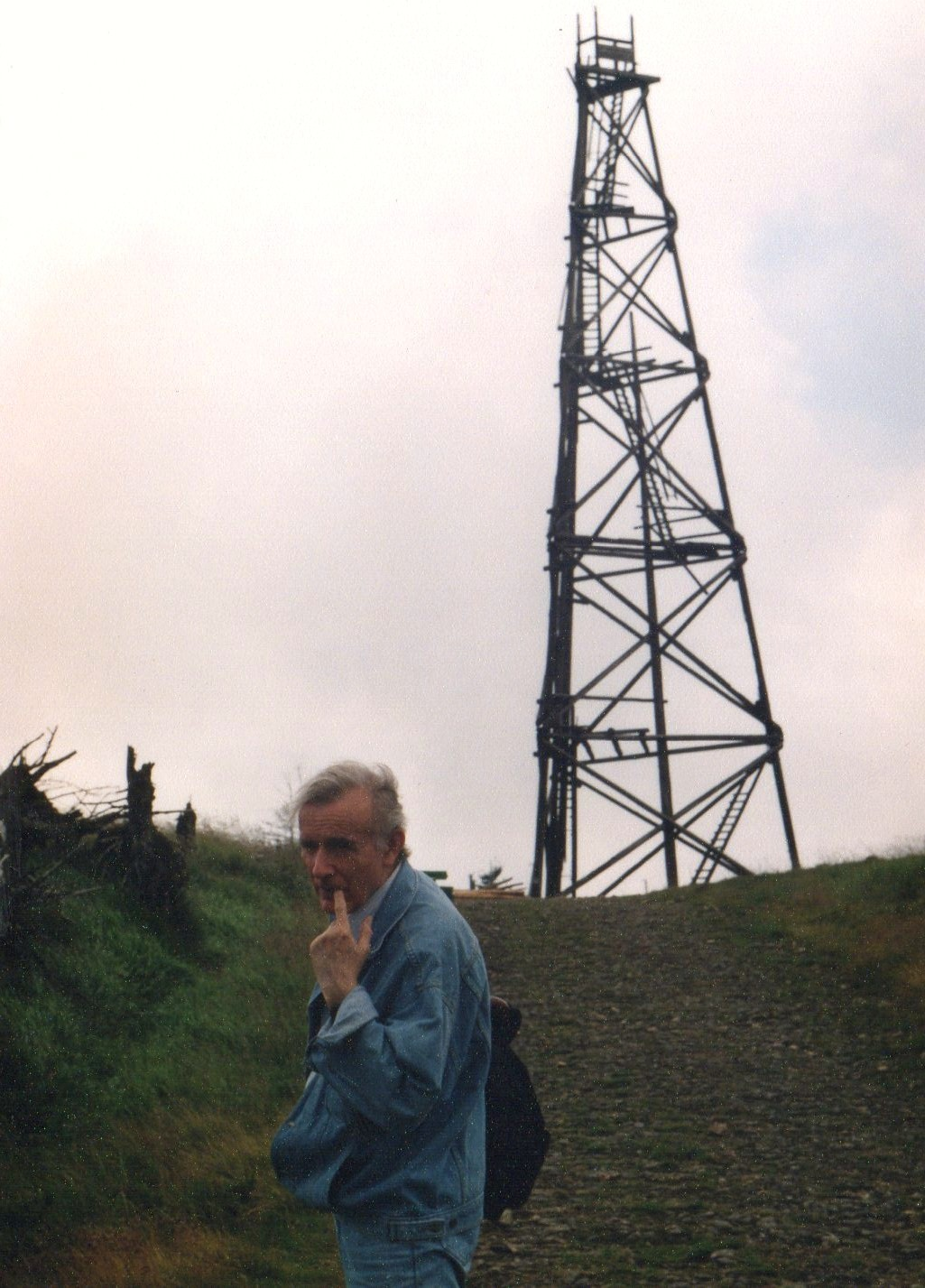 Stóg Izerski w 1997r.